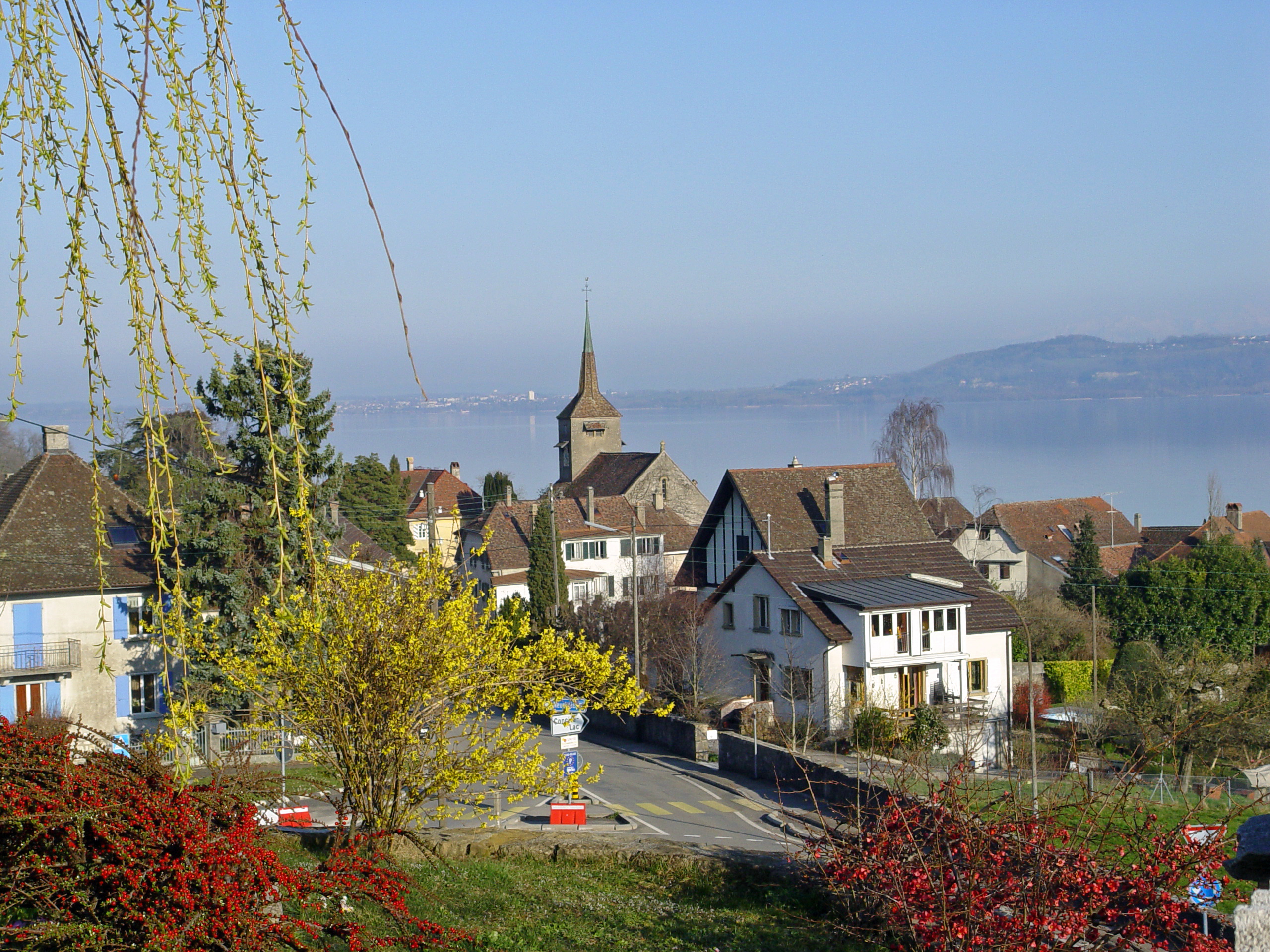 Concise von oben